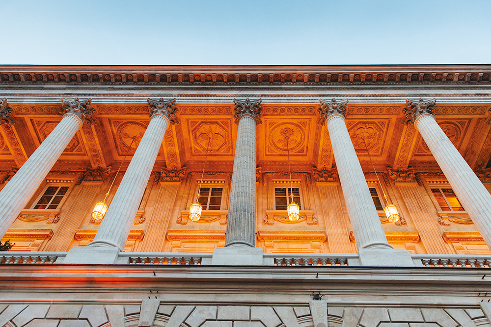 Façade de l'ACF